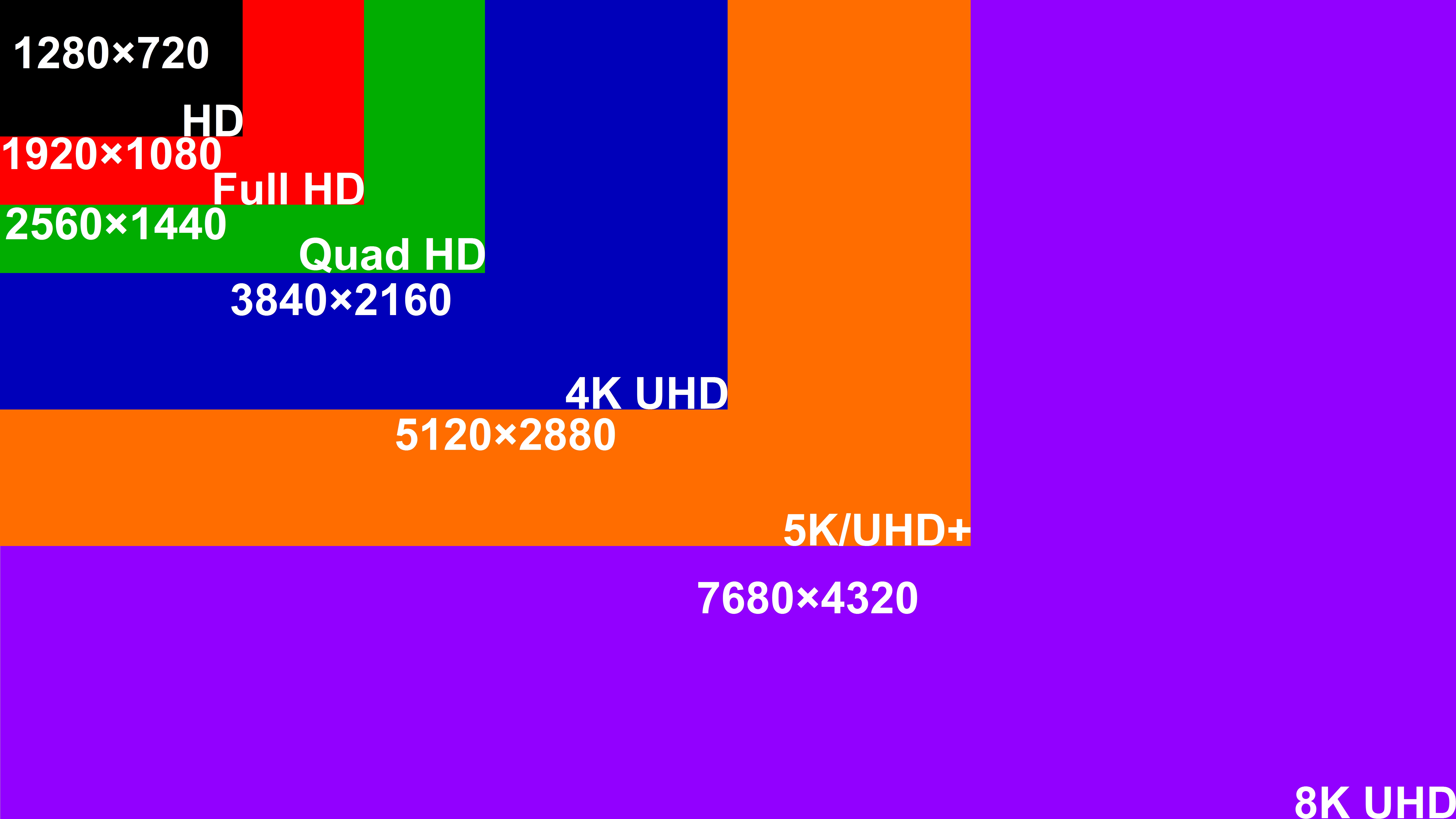 Aqui vemos as resoluções desde HD (720p) Até o 8K (4320p)